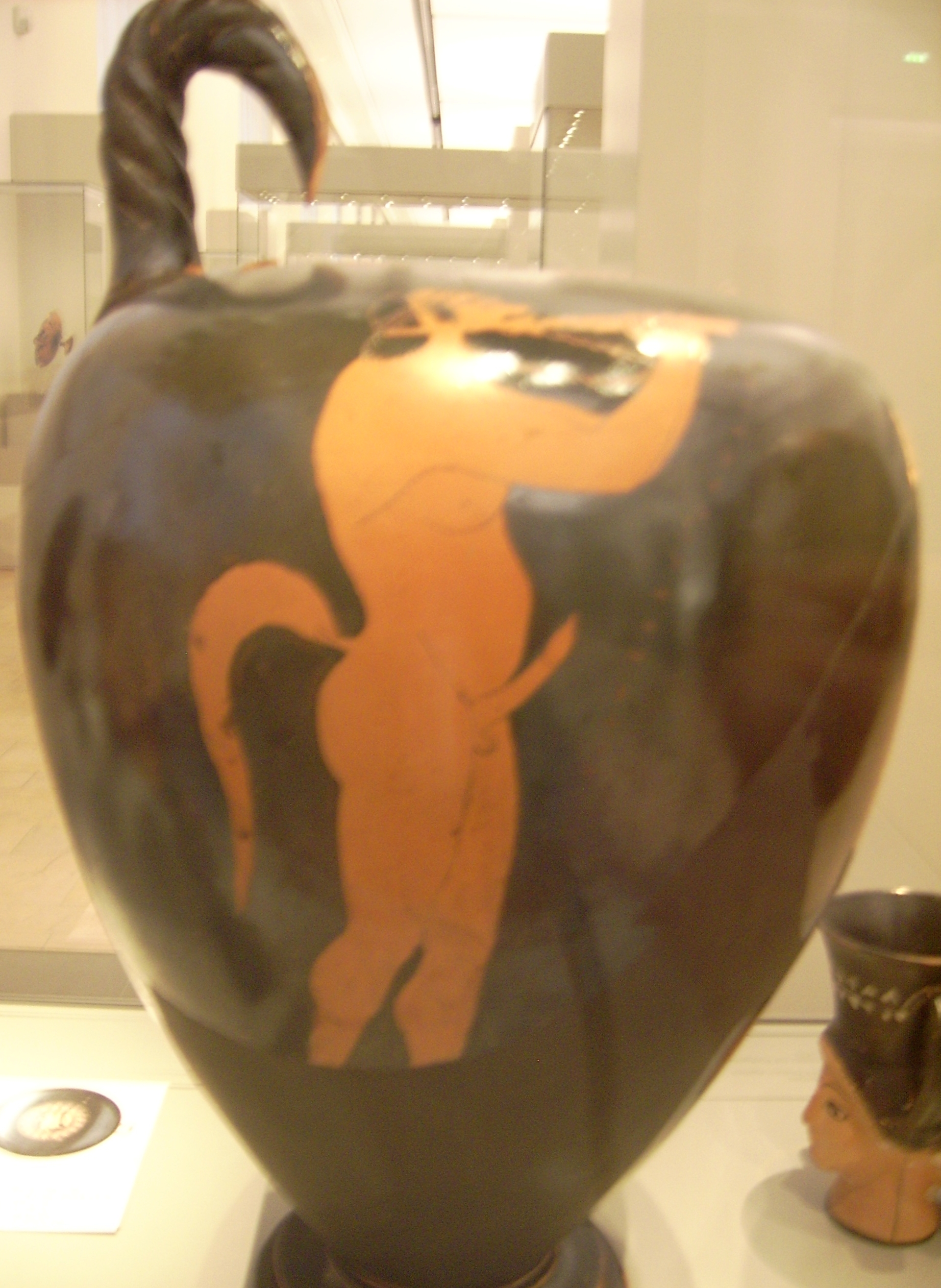 Der Silen Stysippos beim Waffentanz. Attisch-rotfigurige Halsamphora, signiert vom Maler Smikros. Um 510 v. Chr. Antikensammlung Berlin/Altes Museum